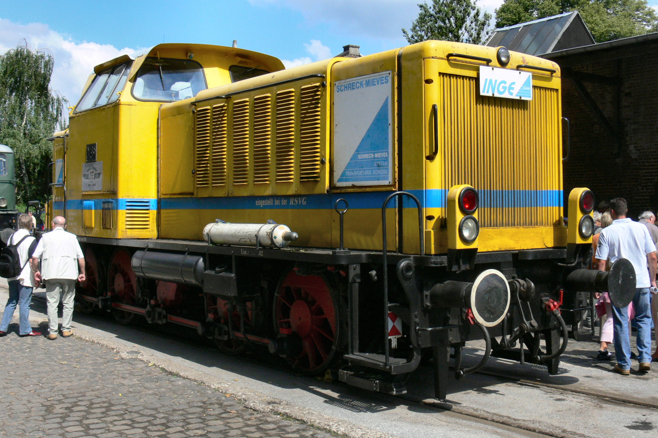 MaK 600 D der Schreck-Mieves GmbH in Kaldenkirchen